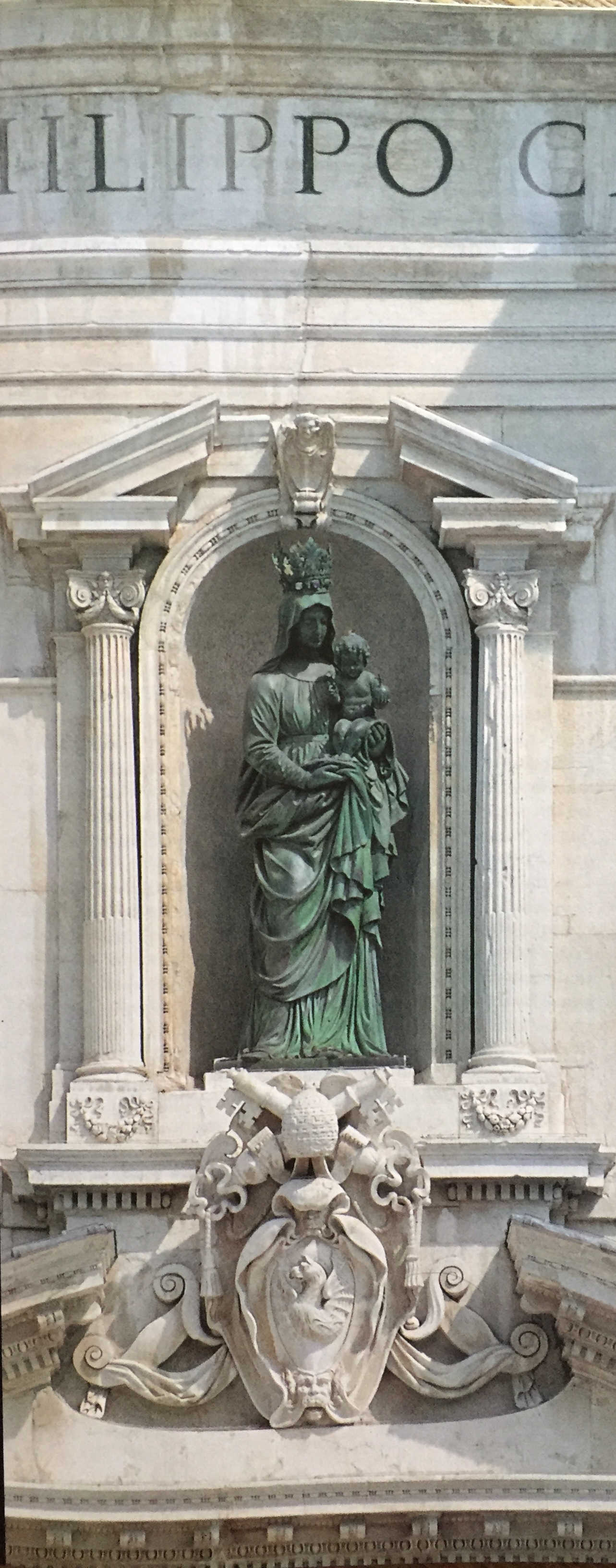 in Itinerari della Fede, Regione Marche